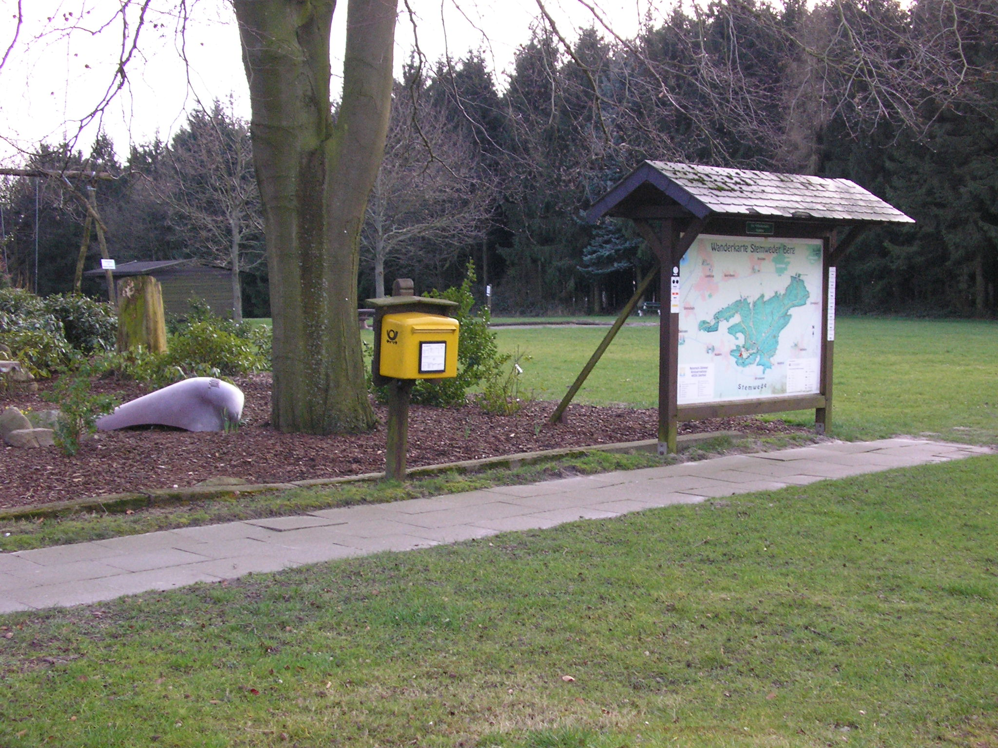 Auf dem Gipfel des Stemweder berges